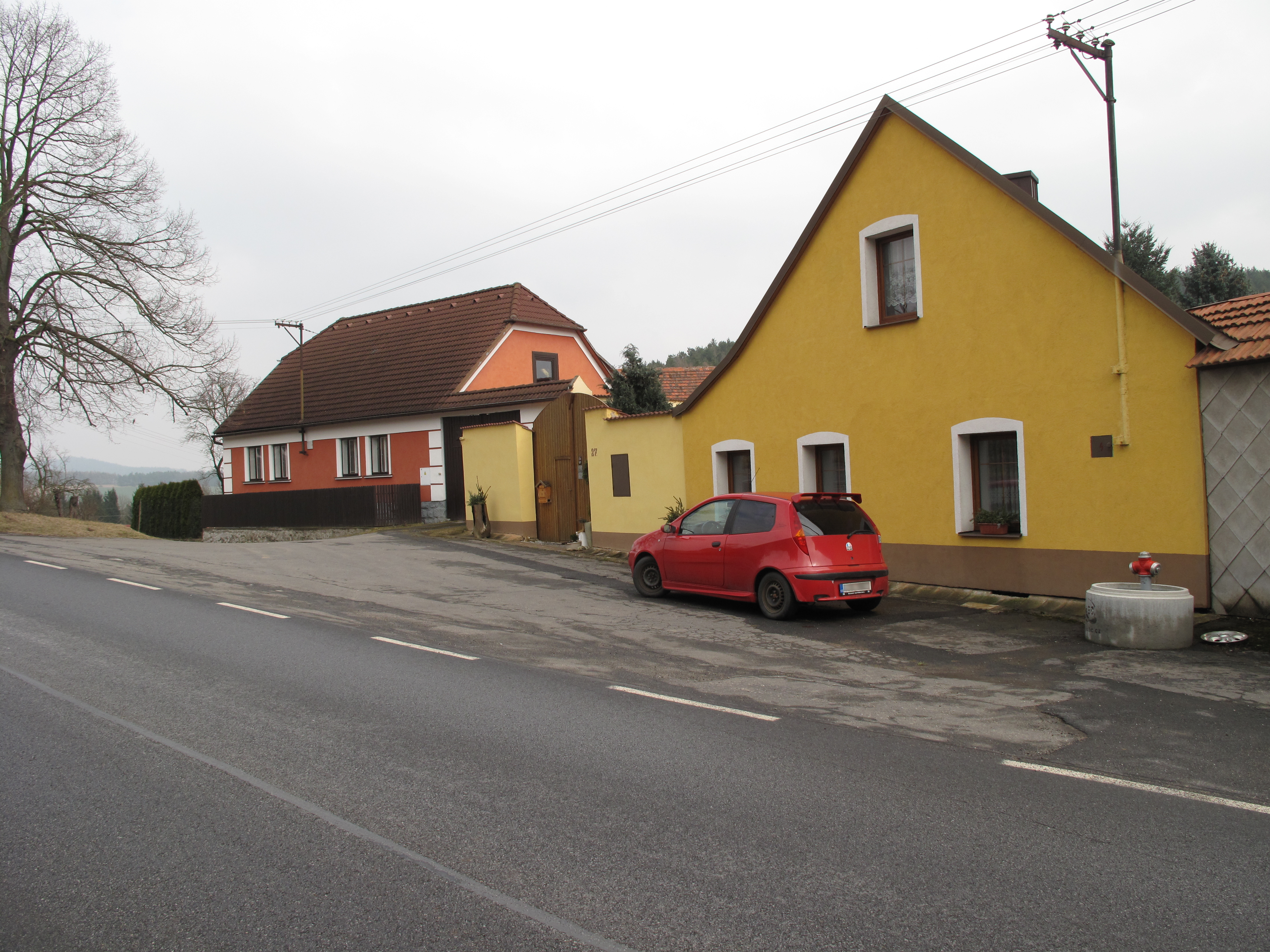 Domy v Újezdci. Okres Prachatice, Česká republika.